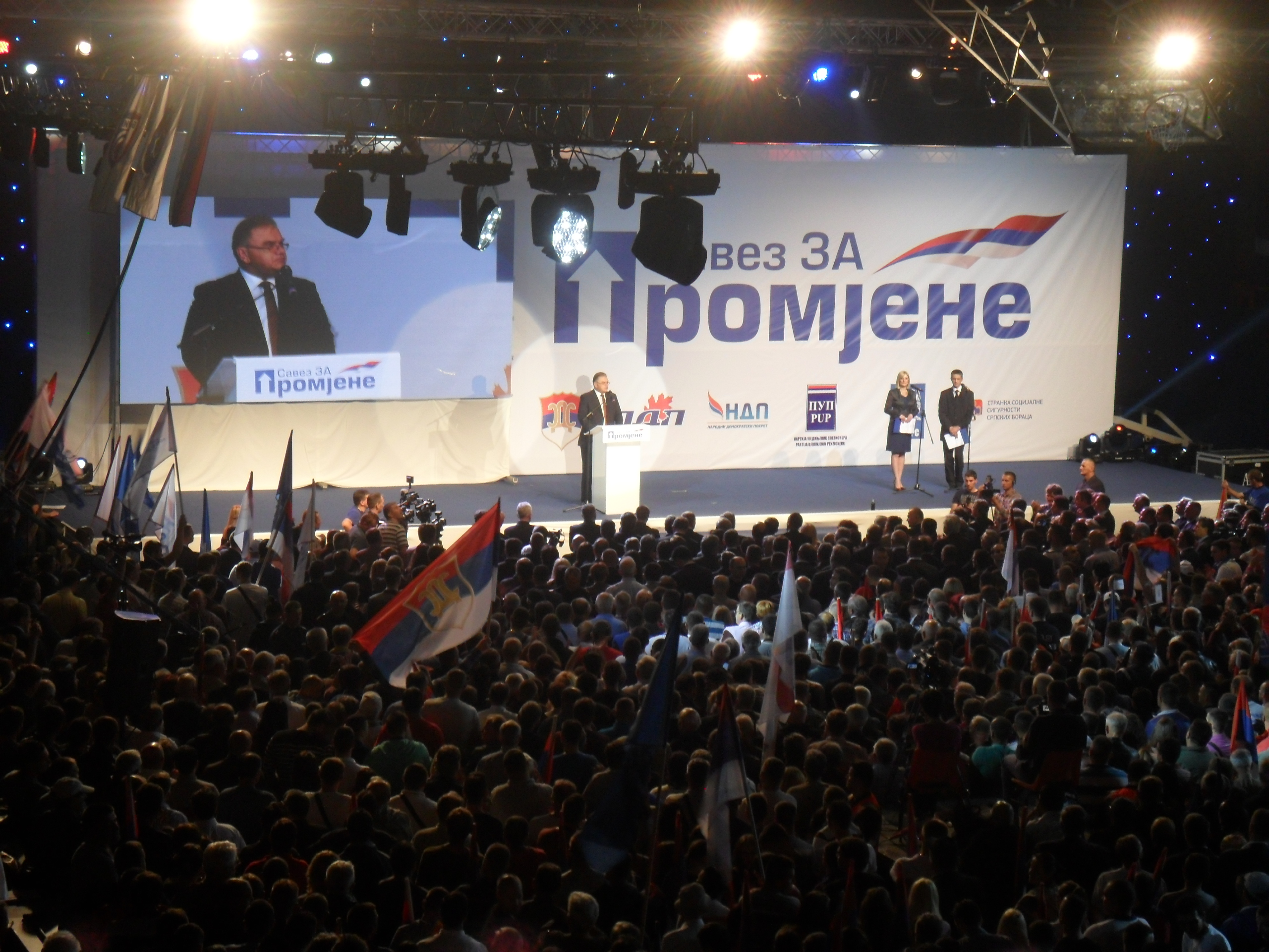 Српски (ћирилица): Младен Иванић на митингу Савеза за промјене у Бањој Луци, 12. септембра 2014.